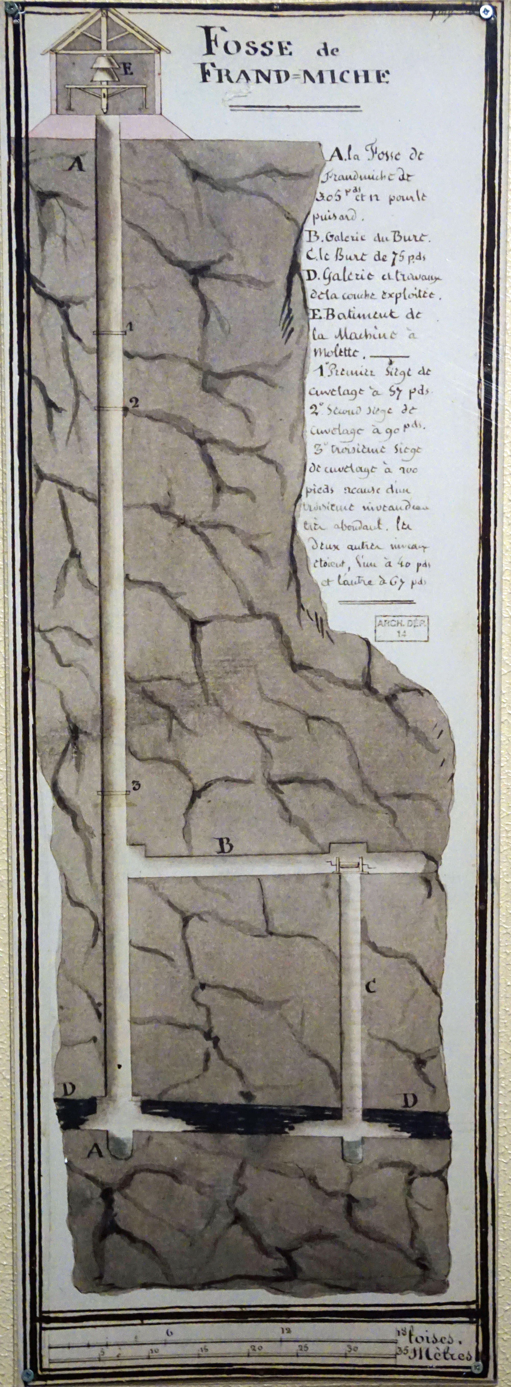 Plan géologique en coupe de la Fosse Frandemiche.